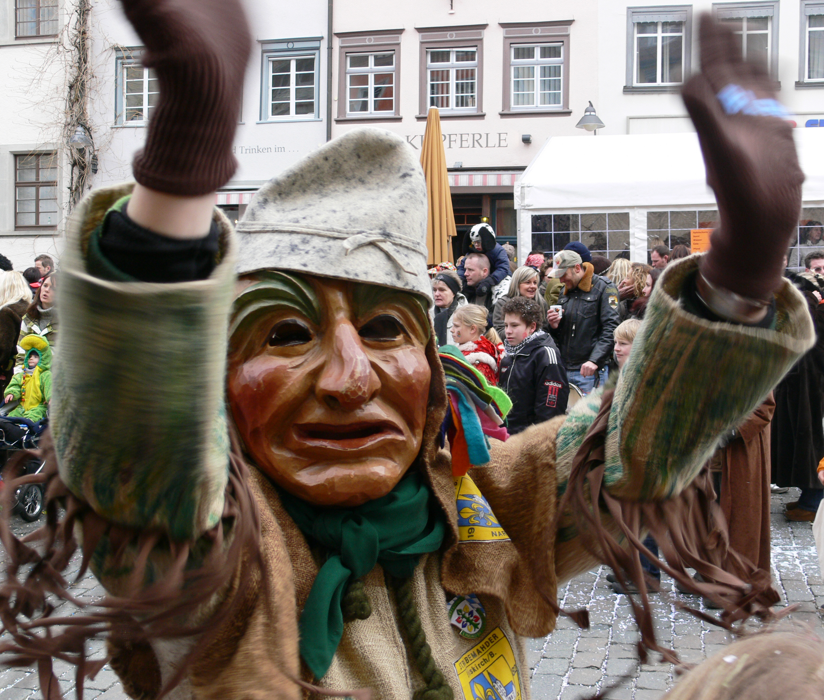 Narrensprung am Fasnetsmontag, 4. Februar 2008 in Ravensburg: Streibemahder der Narrenzunft Streibemahder, Eriskirch